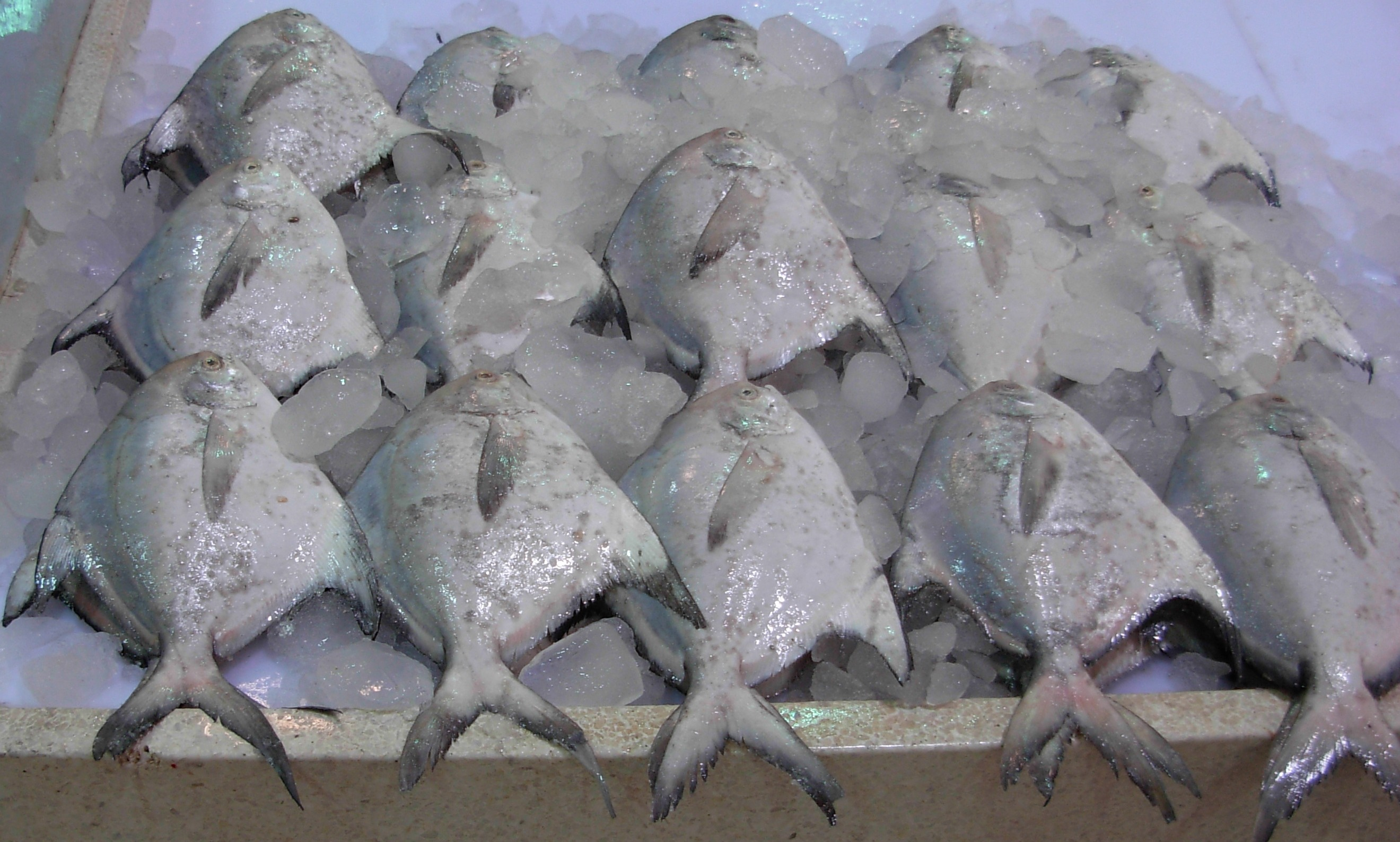 Pomfret white (Pampus argenteus)